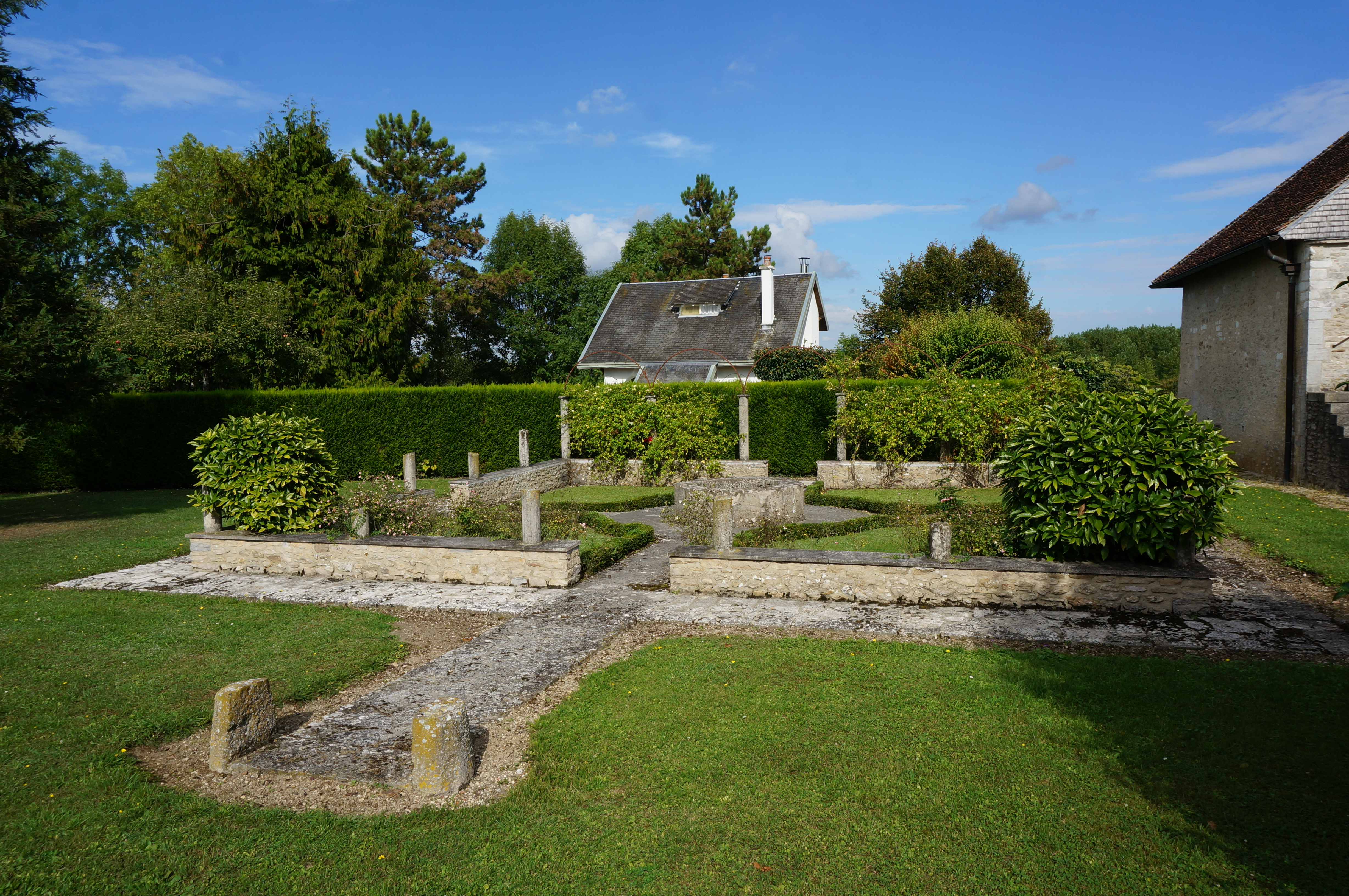 Église Saint-Pierre et nécropoles .